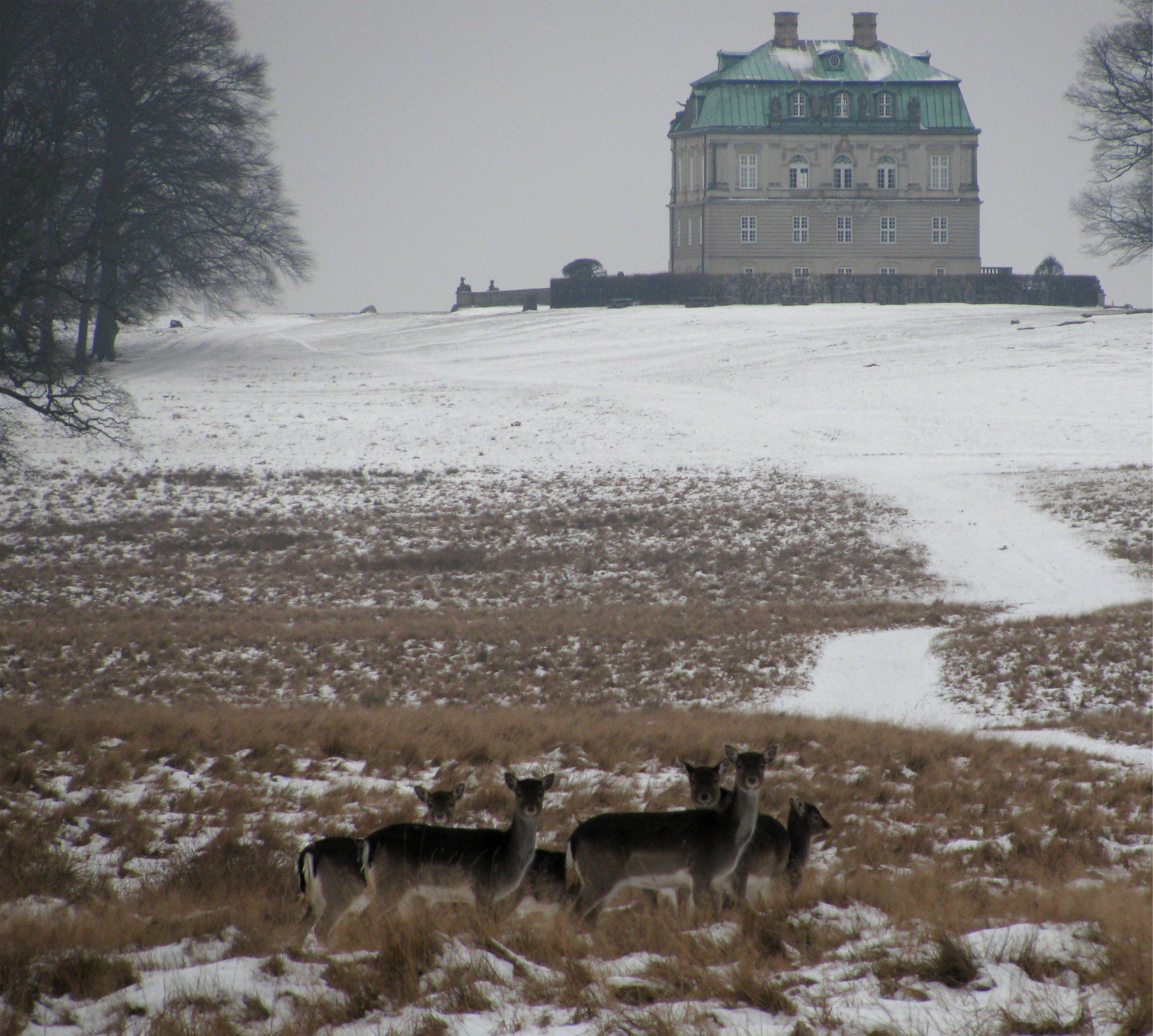 Deers in front of Eremitageslottet in Jægersborg Dyrehave.